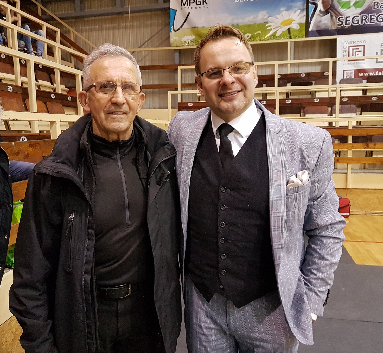 Stargard, 16.12.2017. Były trener Ryszard Janik Szczerbala